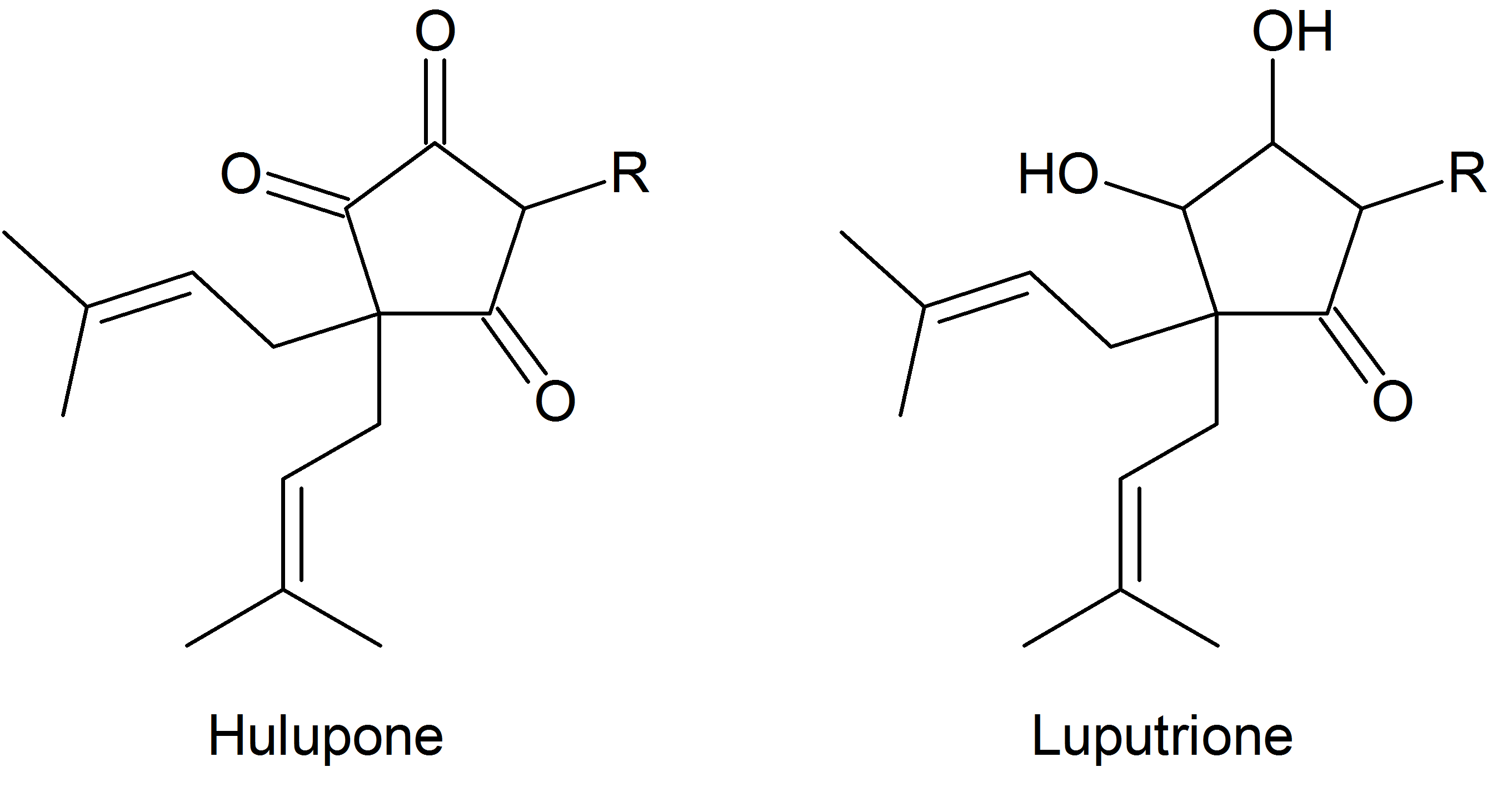 Strukturformeln der Hulupone und Luputrione